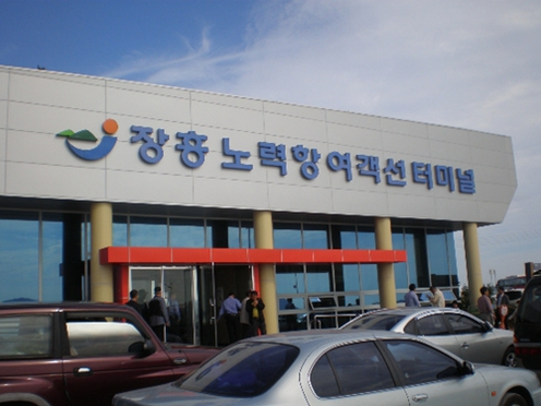 전남 장흥에 위치한 노력항.